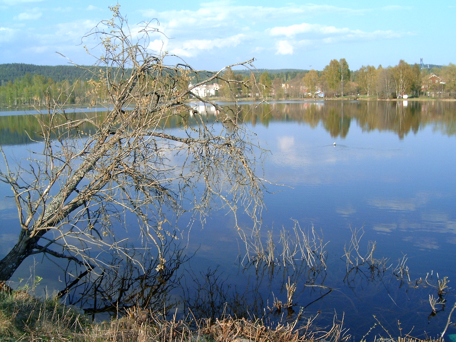 Vattendrag vid Östanfors i Falun. I bakgrunden kan man se Lugnet (hopptornet).